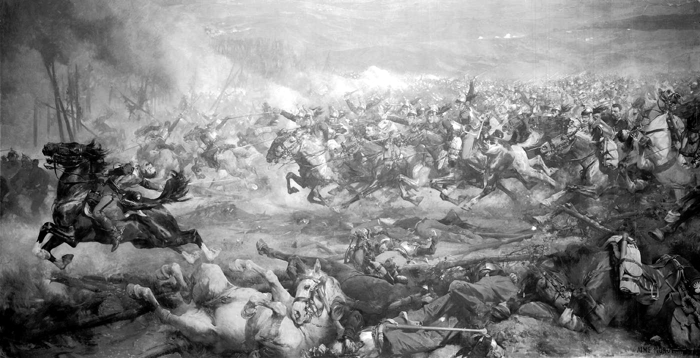 "La bataille de Reichshoffen, 6 août 1870". Représentation de la charge de la cavalerie française face aux Prussiens, à Woerth. Le colonel de Lacarre (à gauche) vient de se faire tuer mais son cheval continue de galoper à l'avant du 3e régiment de Cuirassiers (en réalité il a été décapité par un boulet).